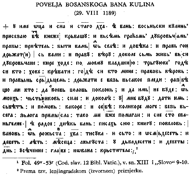 Povelja bosanskog bana Kulina.